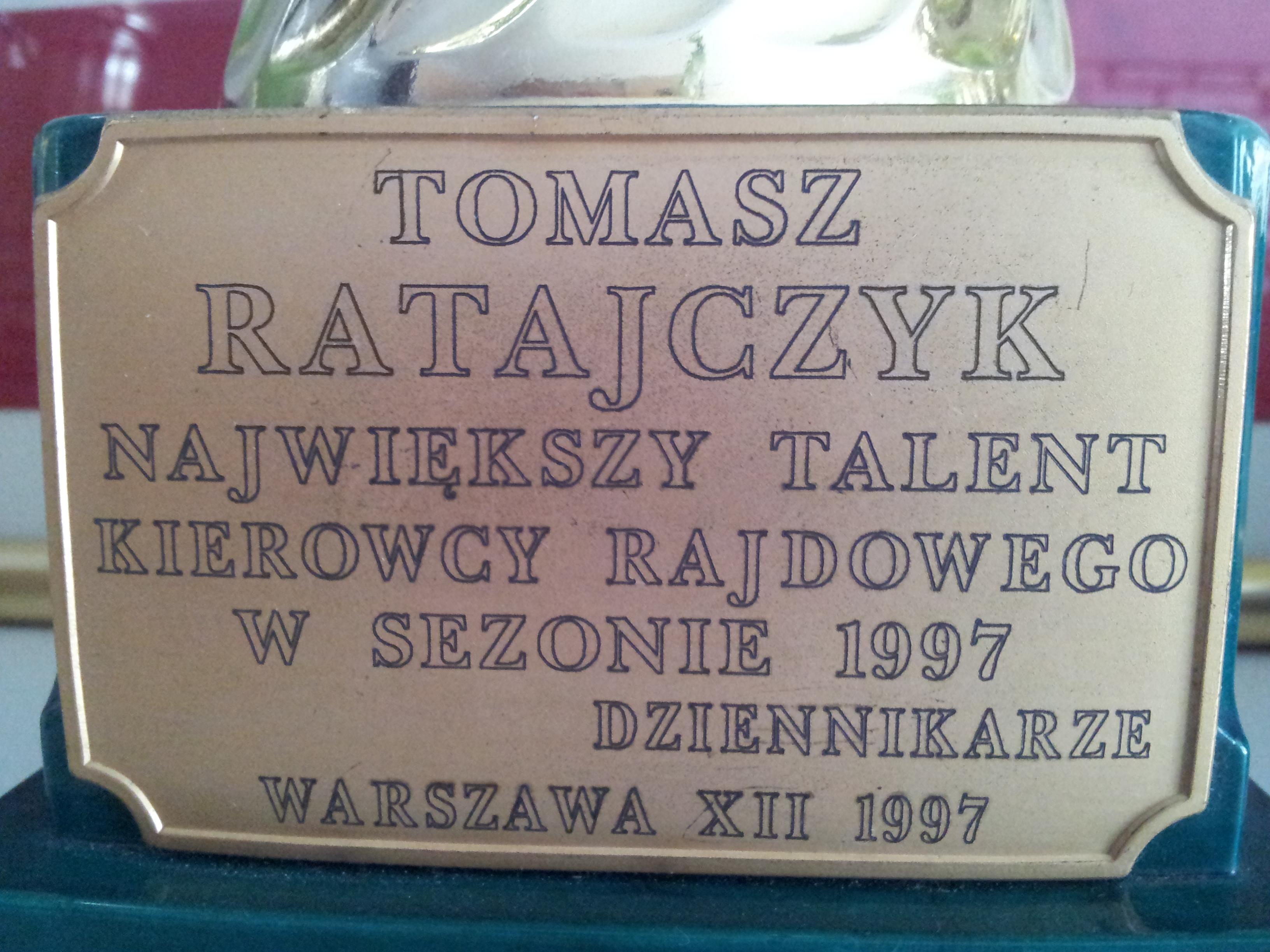 Nagroda przyznana przez dziennikarzy